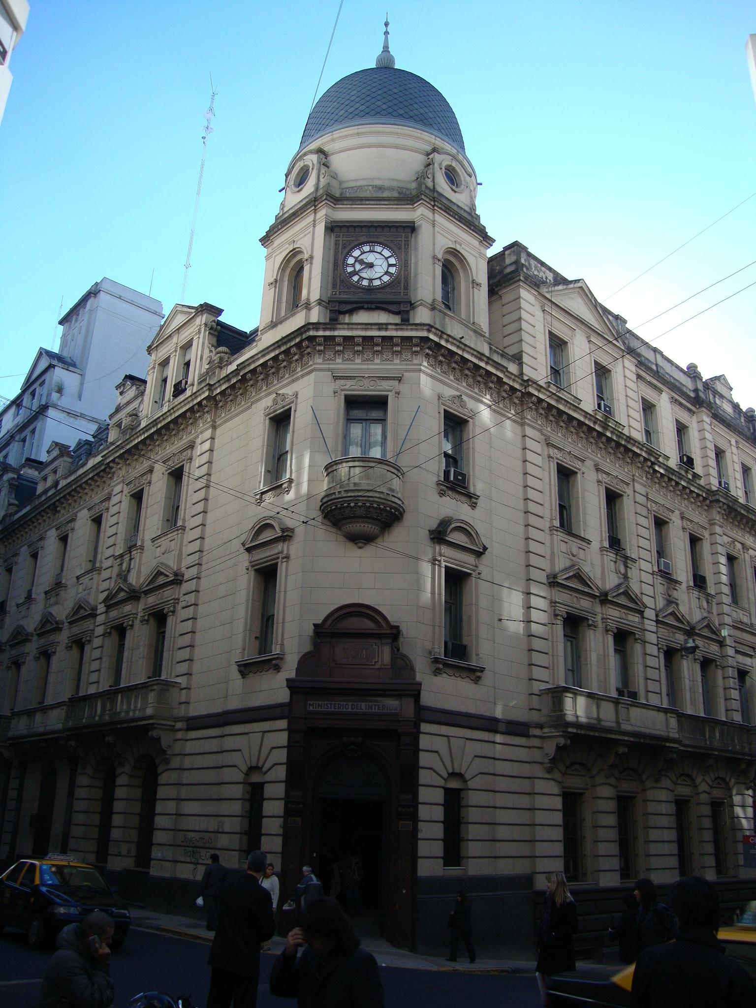 Edificio principal que ocupa el Ministerio del Interior de la República Argentina. Construido para oficinas centrales del Ferrocarril Central Argentino en 1900, arquitecto Eustace Lauriston Conder. 25 de Mayo nº 101. Buenos Aires, Argentina.